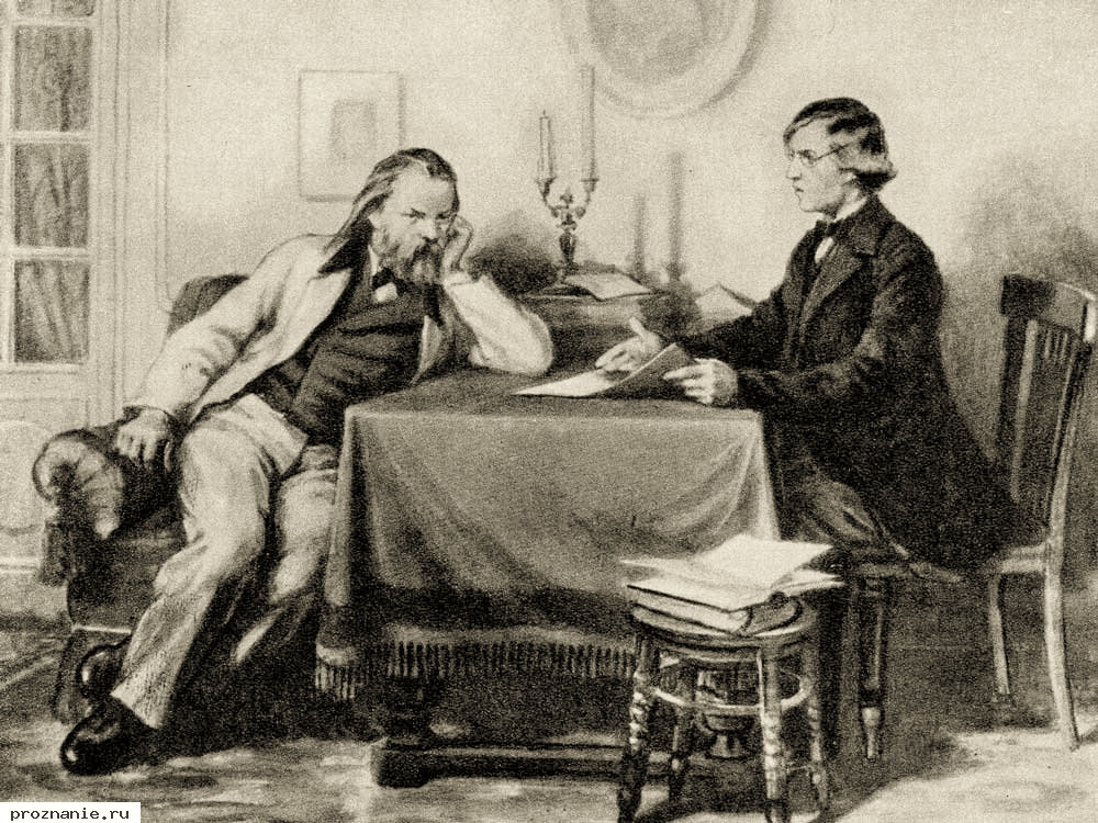 Černyševskij a Londra nel 1859 con Herzen